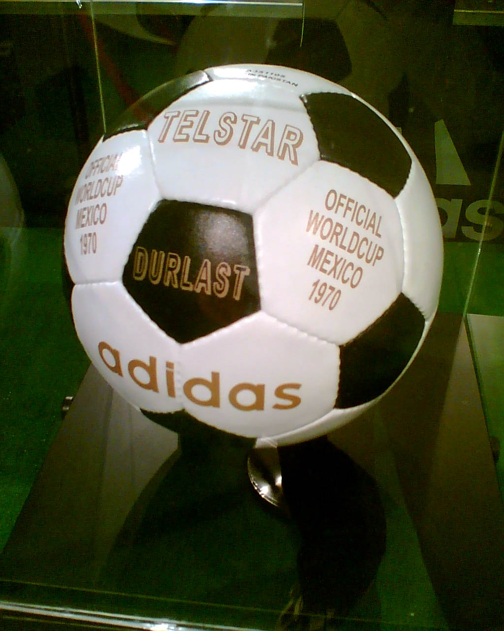 愛迪達Telstar Durlast（1970）